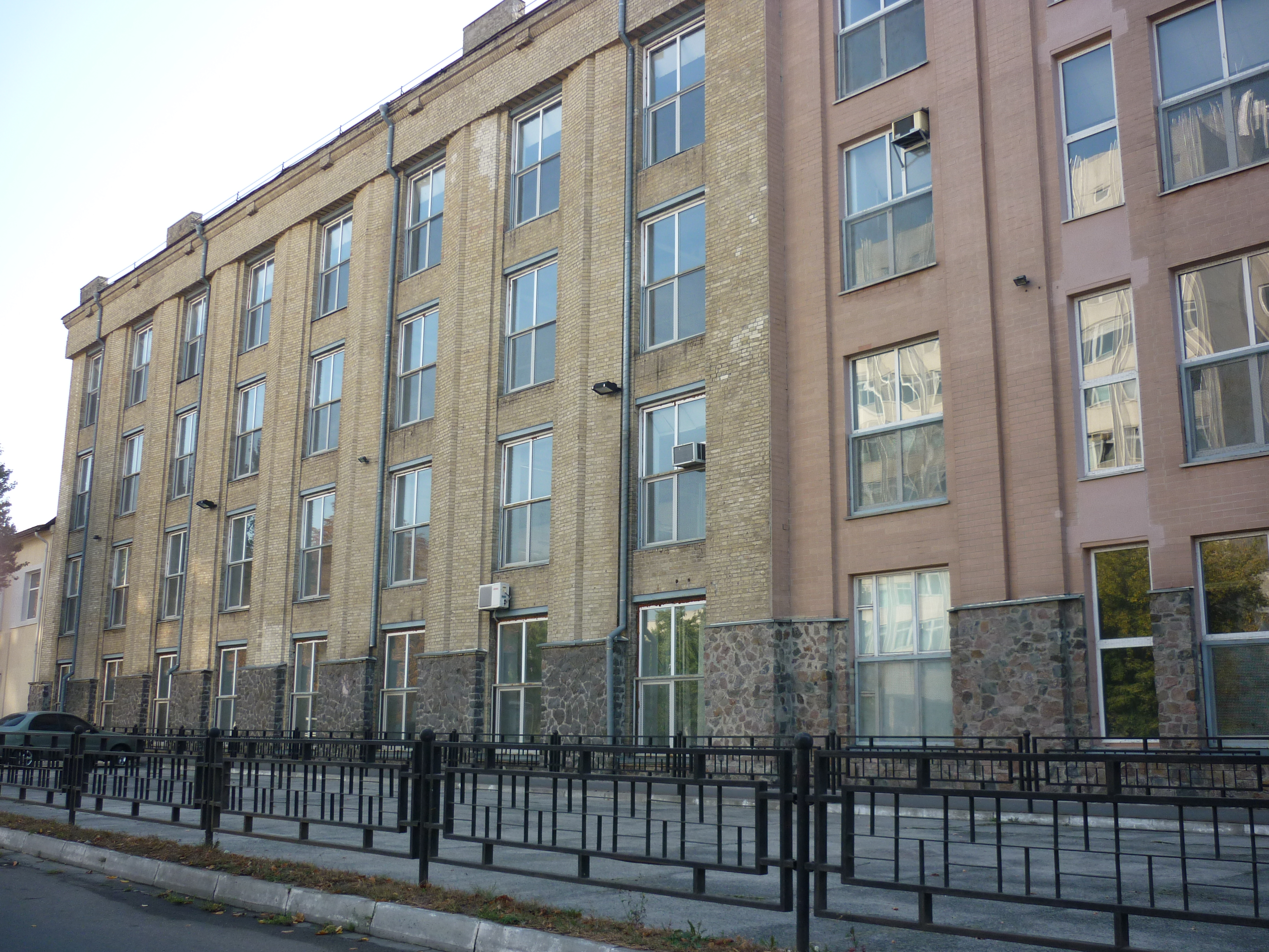 Тютюнова фабрика в Черкасах